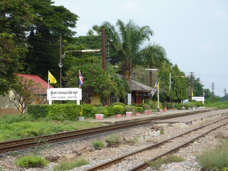 สถานีรถไฟชุมทางหนองปลาดุก